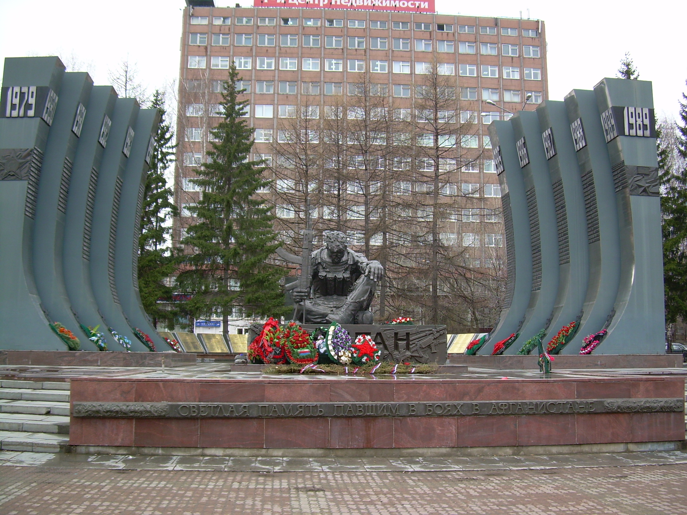 Комплекс памяти "Черный тюльпан"